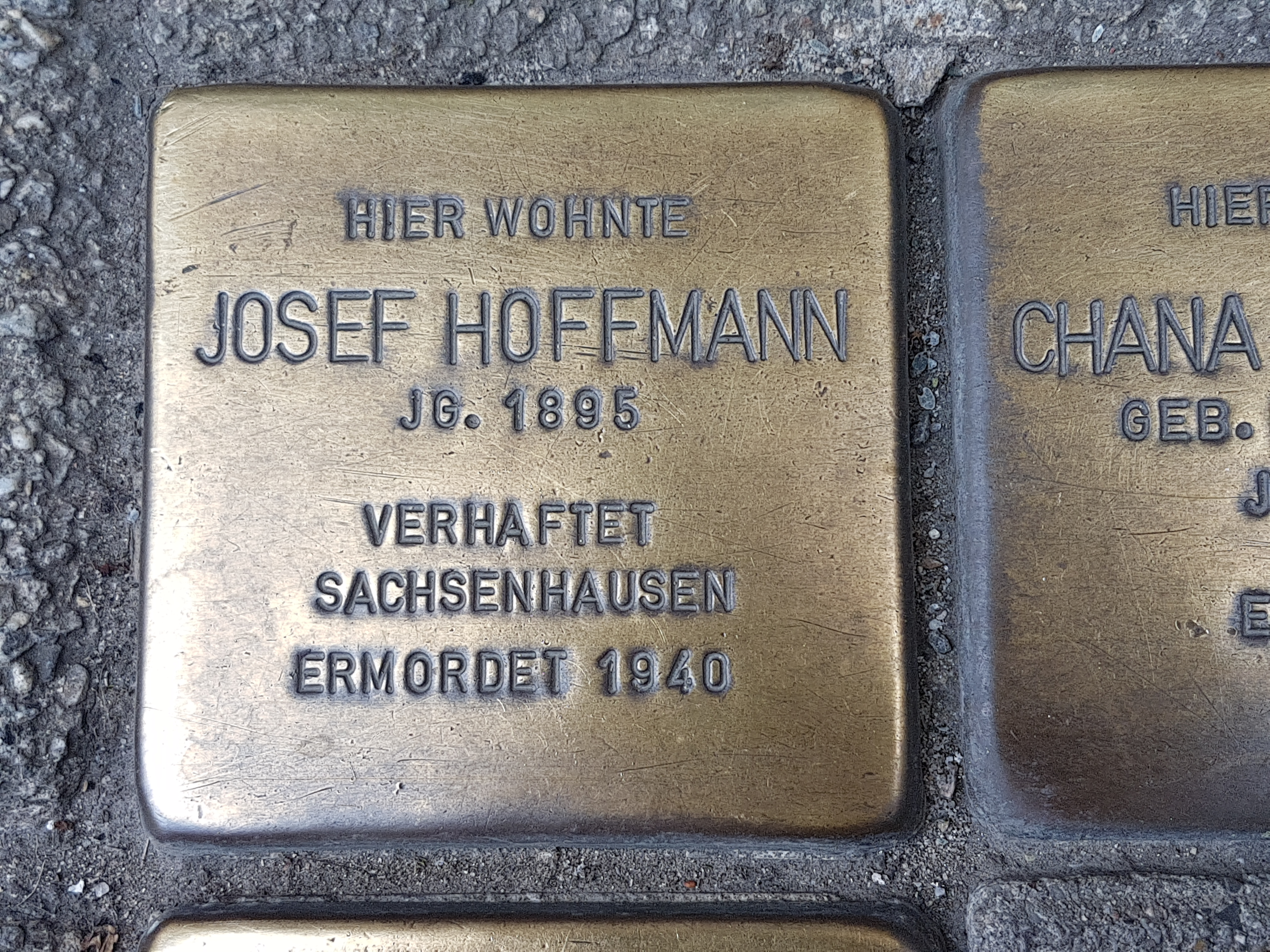 Josef Hoffmann Stolpersteine Duisburg